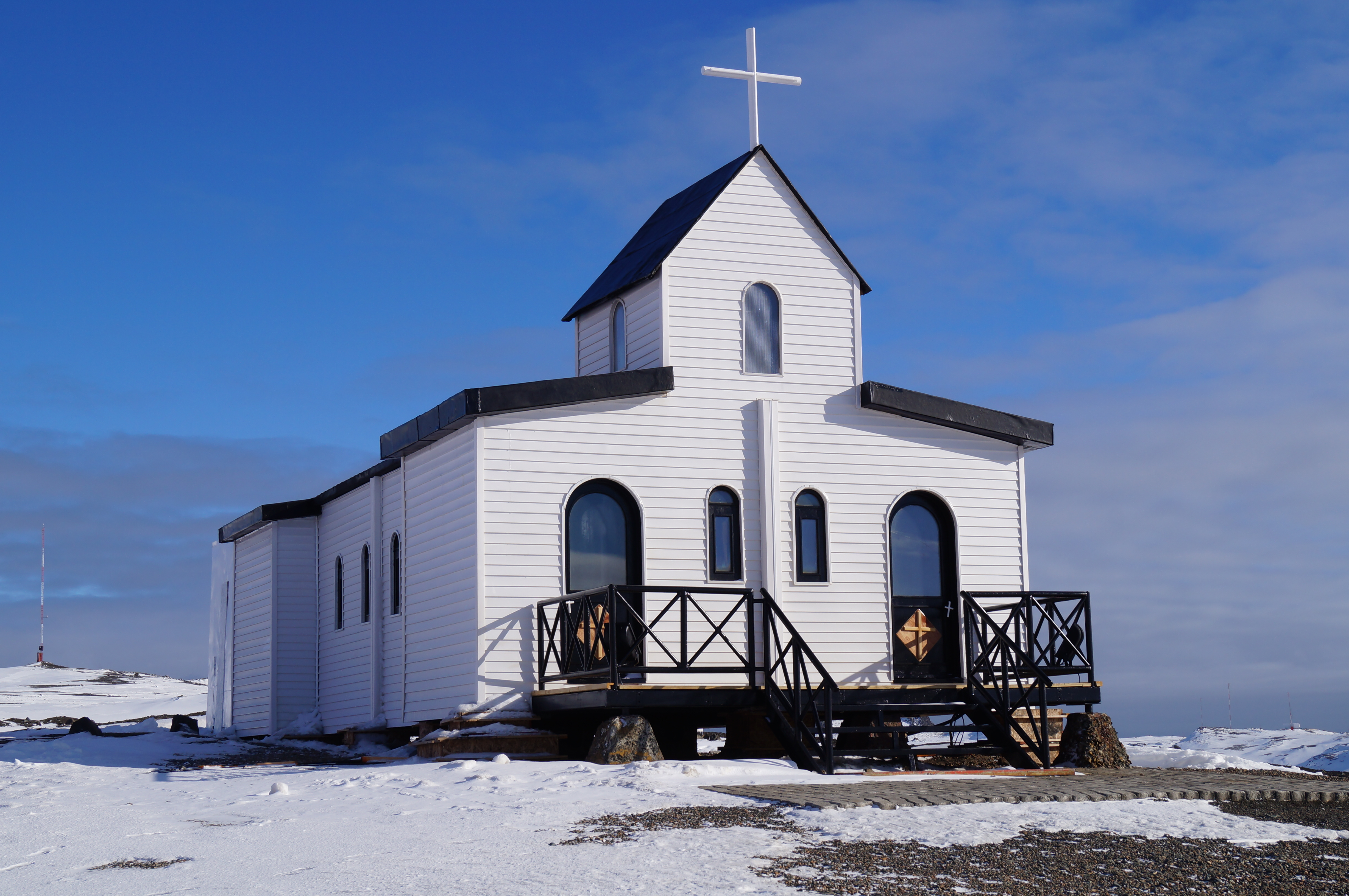 Esta es la fotografia actualizada de la renovada capilla de la Base Aerea Antartica Presidente Eduardo Frei Montalva en territorio antartico chileno, en el archipielago Shettland del sur, Isla Rey Jorge.